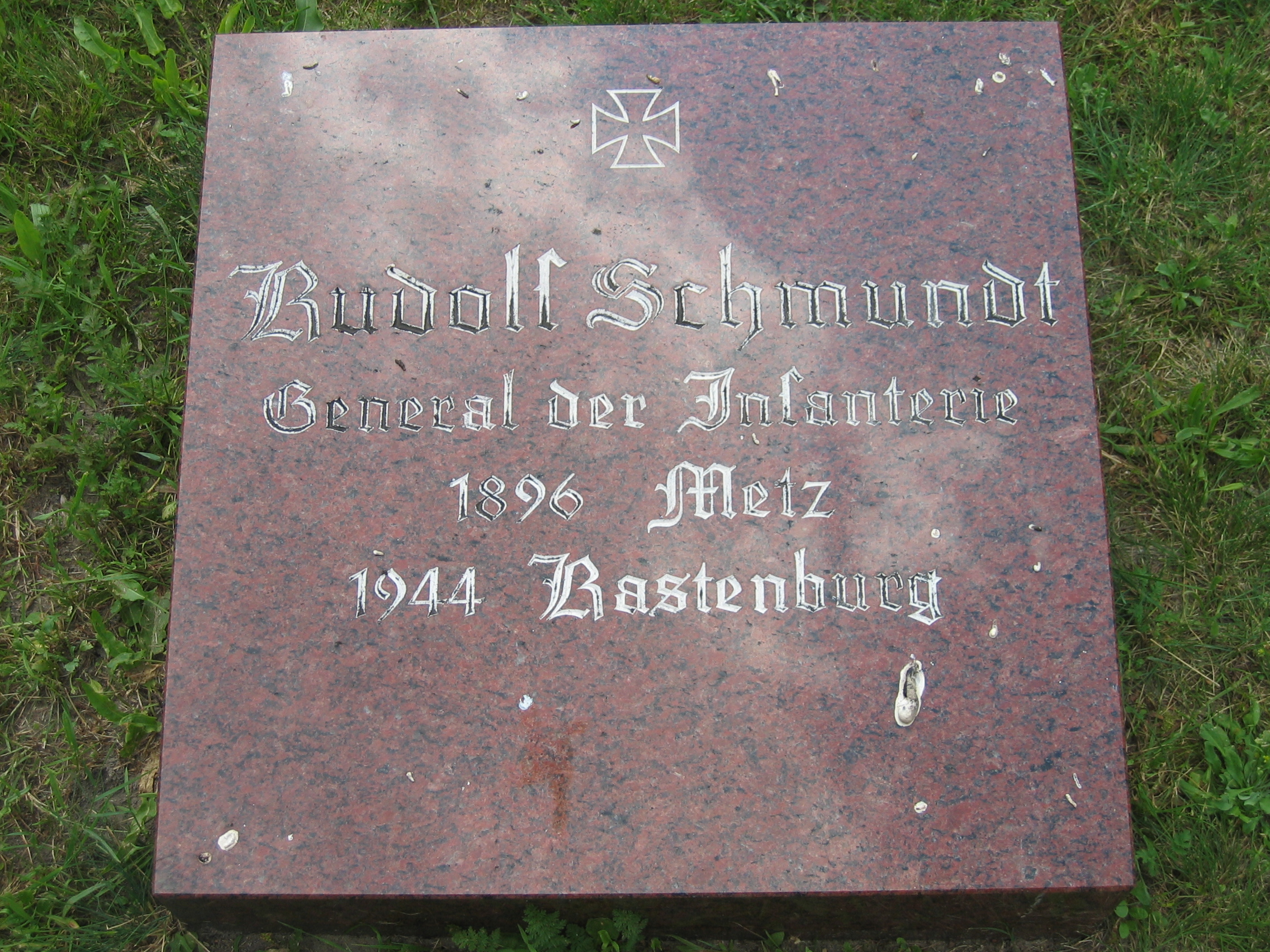 Grab von Rudolf Schmudt auf dem Invalidenfriedhof in Berlin